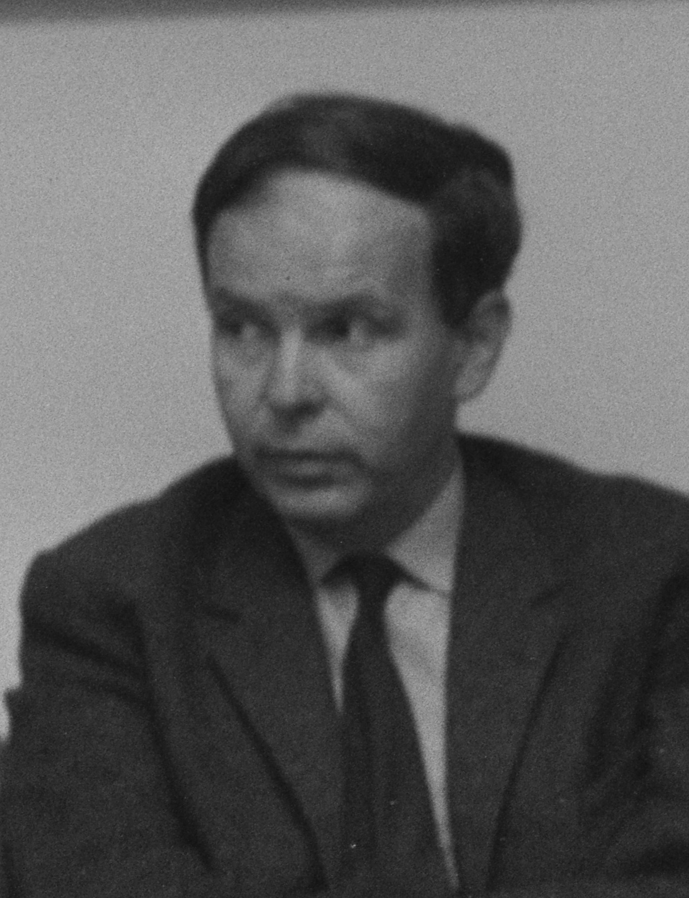 Bildet er hentet fra Arkivverket. Regjeringen Lyngs siste dag, fra debatten i Stortinget Arkivinstitusjon : Riksarkivet Arkivnavn : Billedbladet NÅ Sted : Norge, Oslo, Oslo, Stortinget Emneord: Regjeringer, Lyng Avbildet